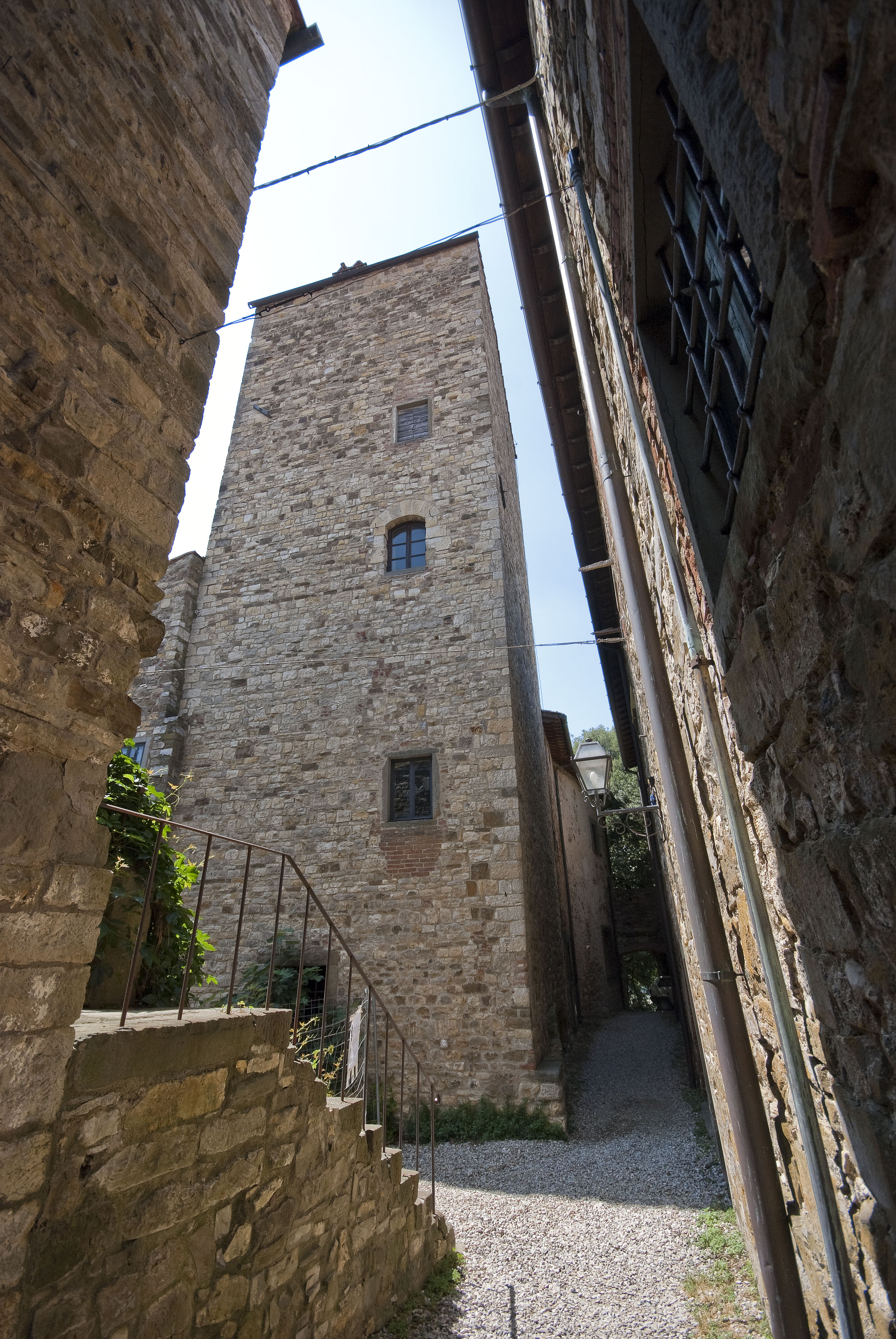 Panzano in Chianti, torre del mastio (XII secolo)